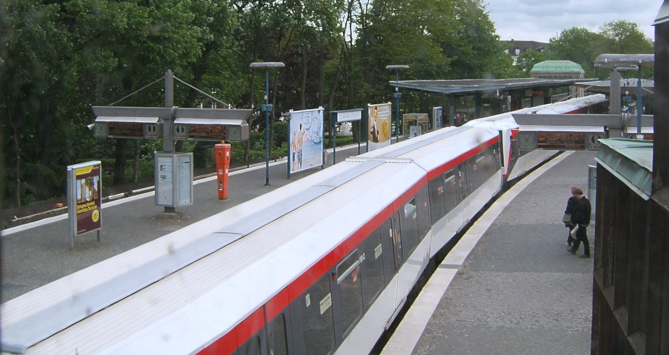 Die Bahnsteige des Bahnhofes Kellinghusenstraße in Eppendorf von der Verbindungsbrücke aus gesehen.